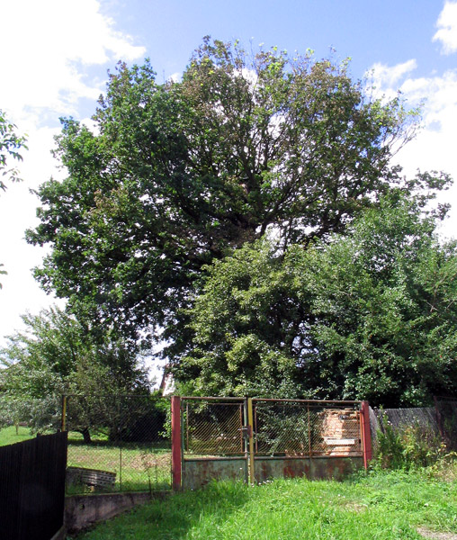 Památný strom Klabavský dub.